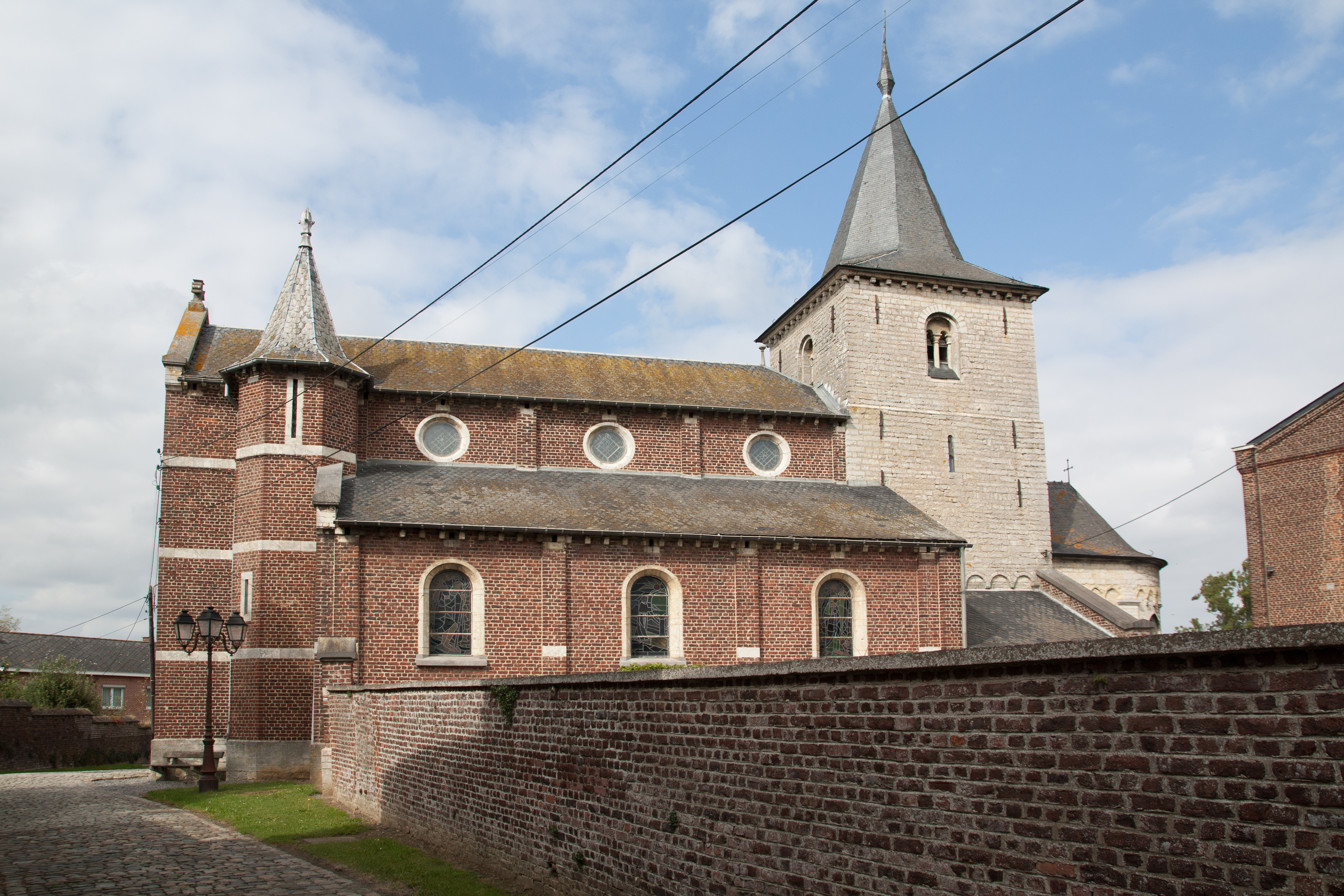 Kerk Saint-Pierre in Saint Marie Geest